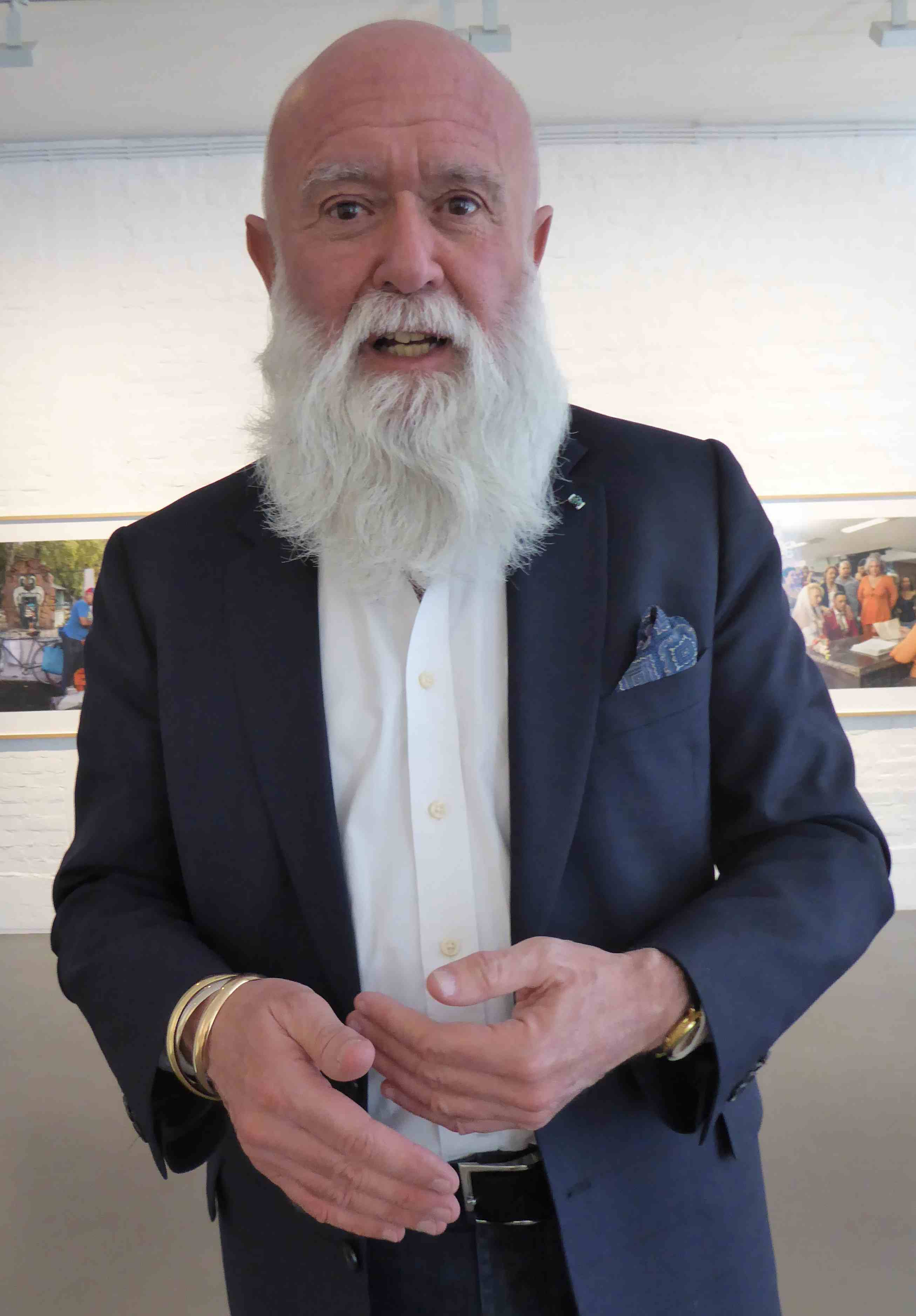 Роберто Поло в своей галерее.